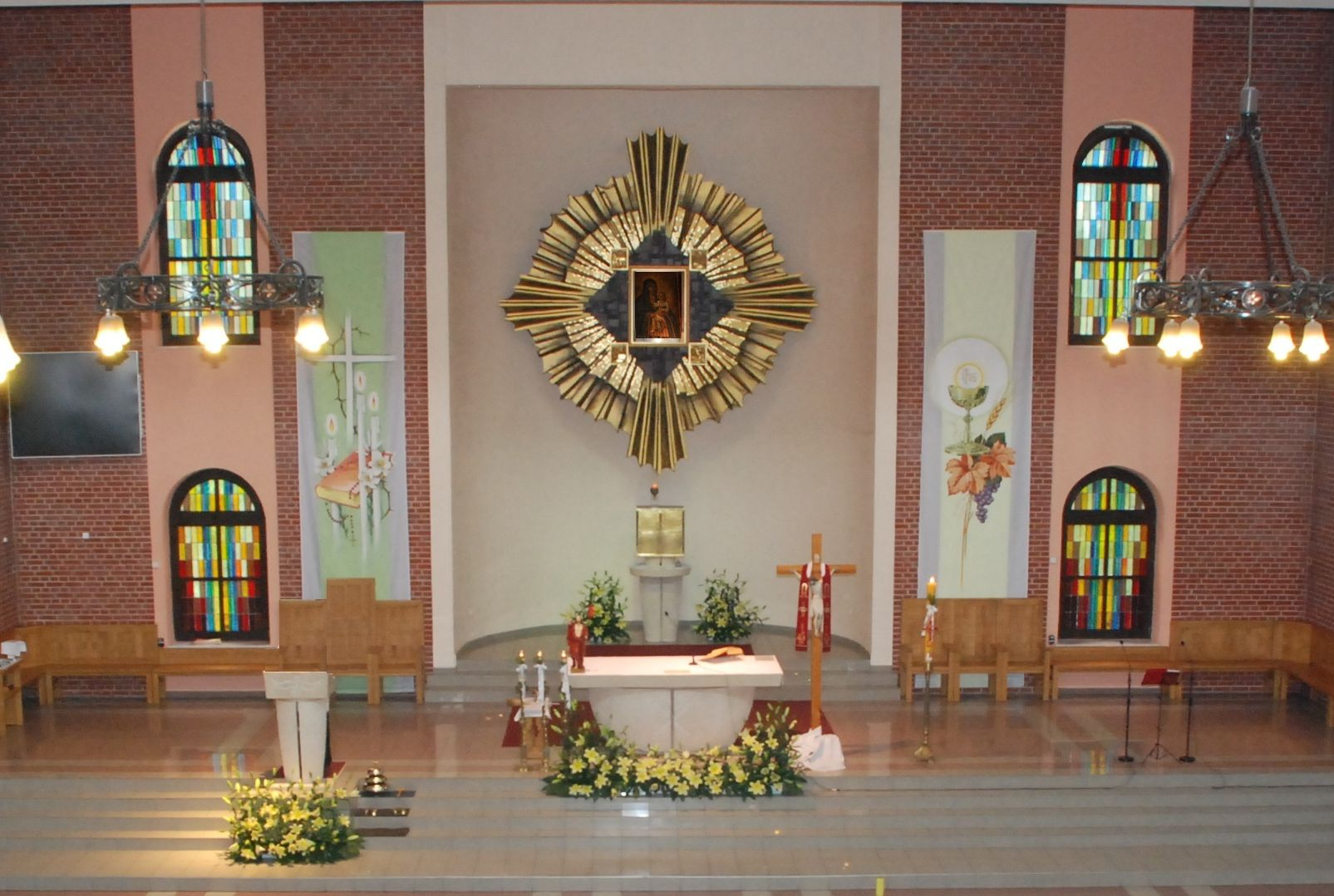 Wnętrze kościoła Matki Bożej Kochawińskiej z ołtarzem głównym